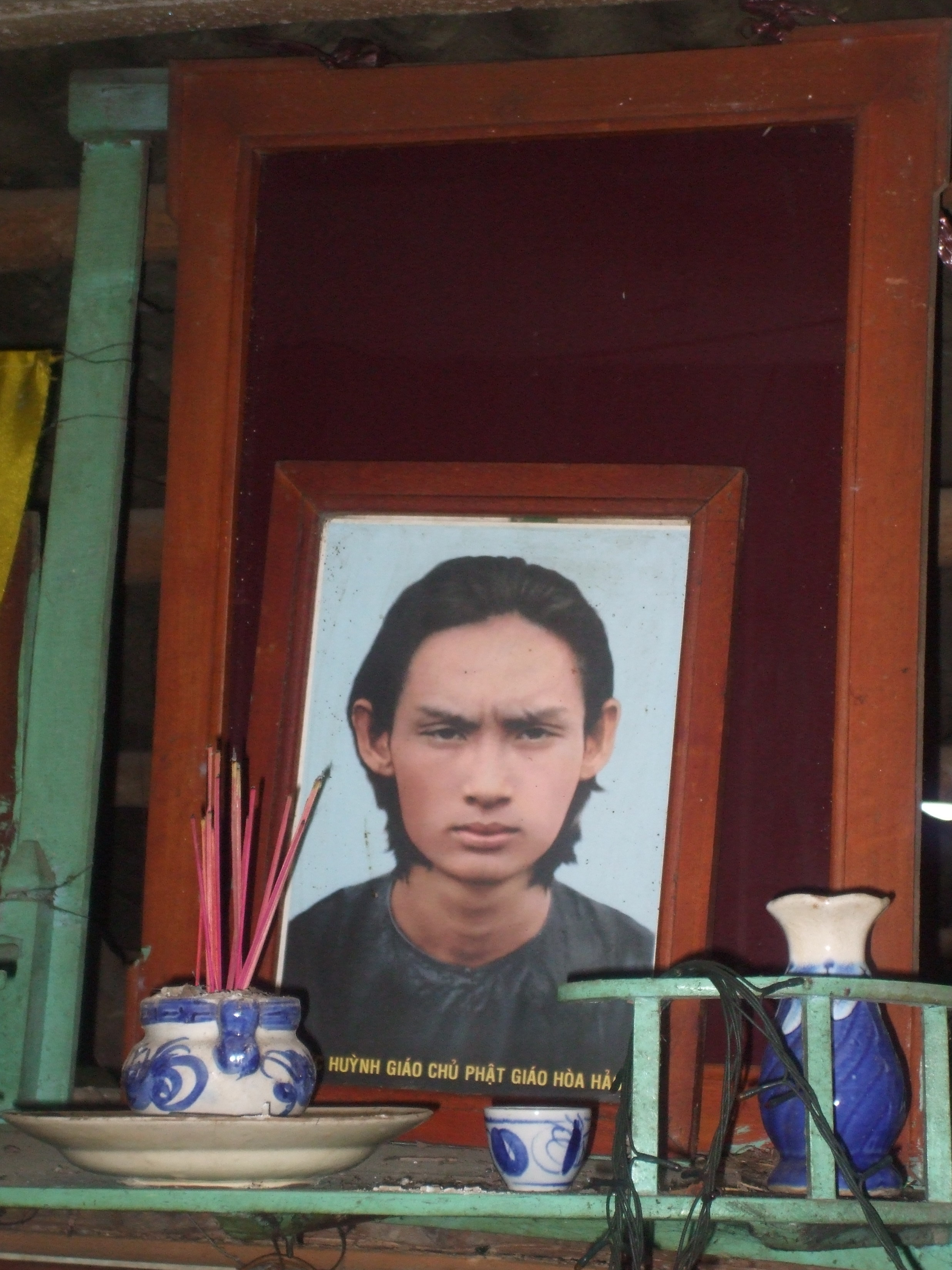 Bàn thờ thờ Huỳnh Phú Sổ, giáo chủ Phật Giáo Hòa Hảo, Việt Nam.